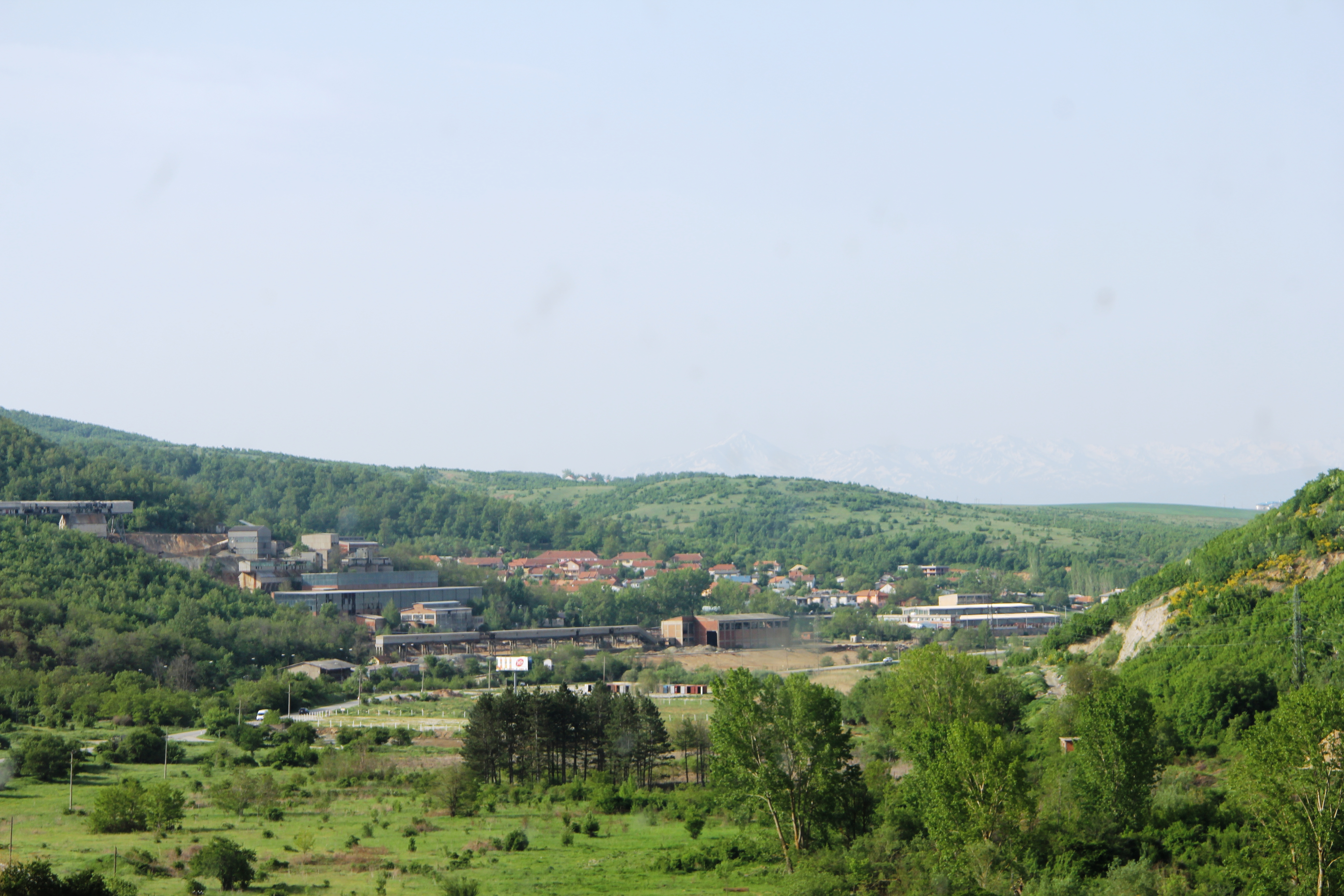 Kishnica, vendbanim në Kosovë